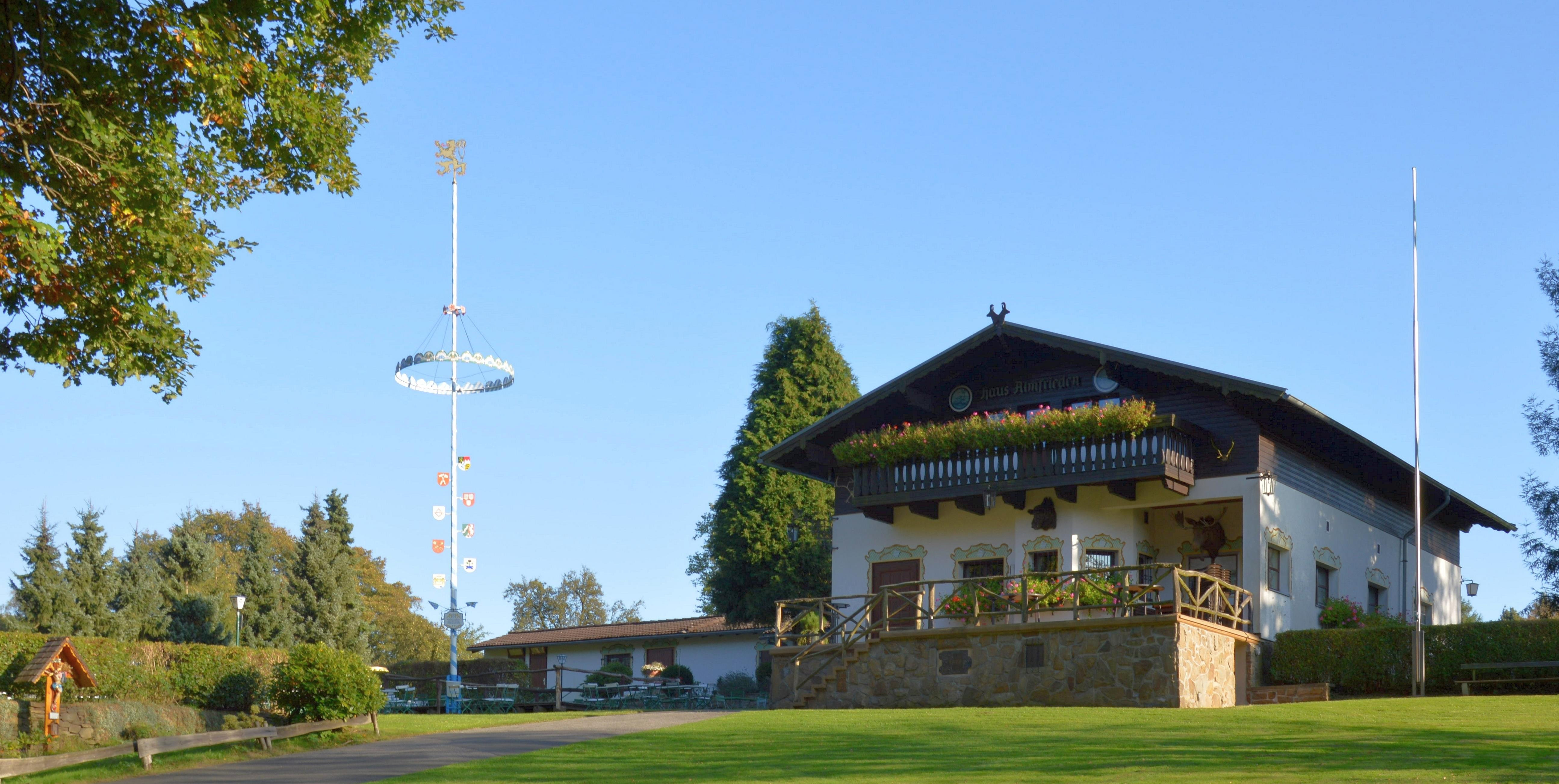 Haus Almfrieden, Vereinsheim des Bayernverein Einigkeit Dortmund e.V.